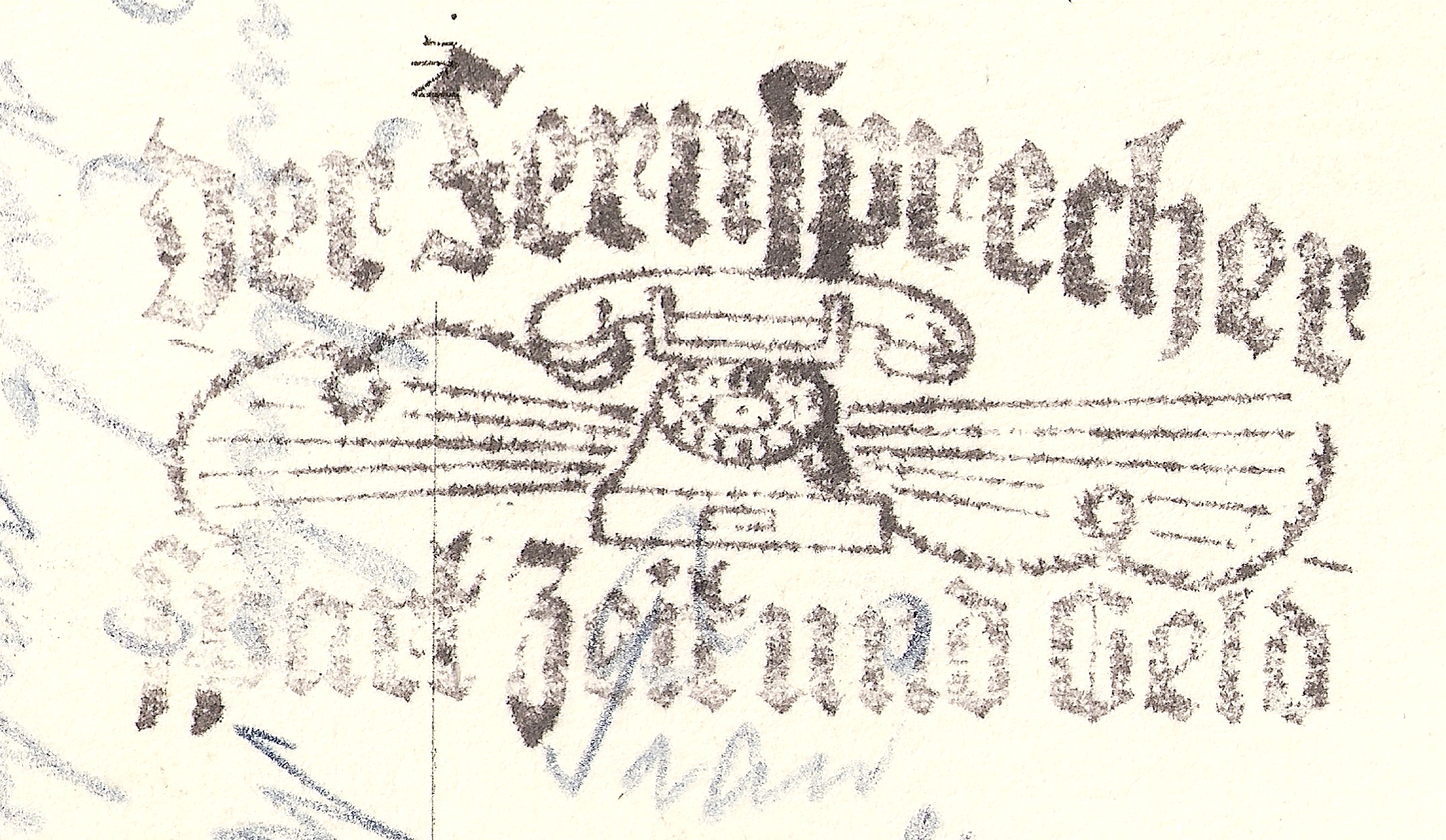 Sonderstempel auf einer Postkarte von 1937: Der Fernsprecher spart Zeit und Geld